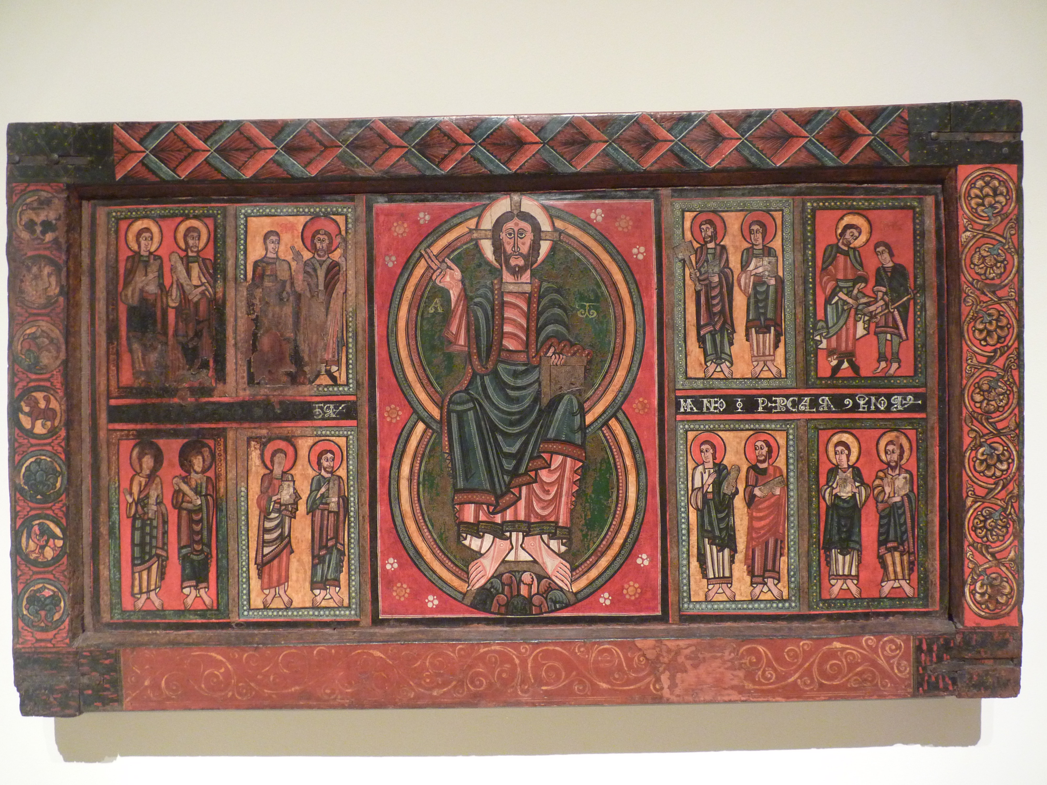 Frontal d'altar d'Ix